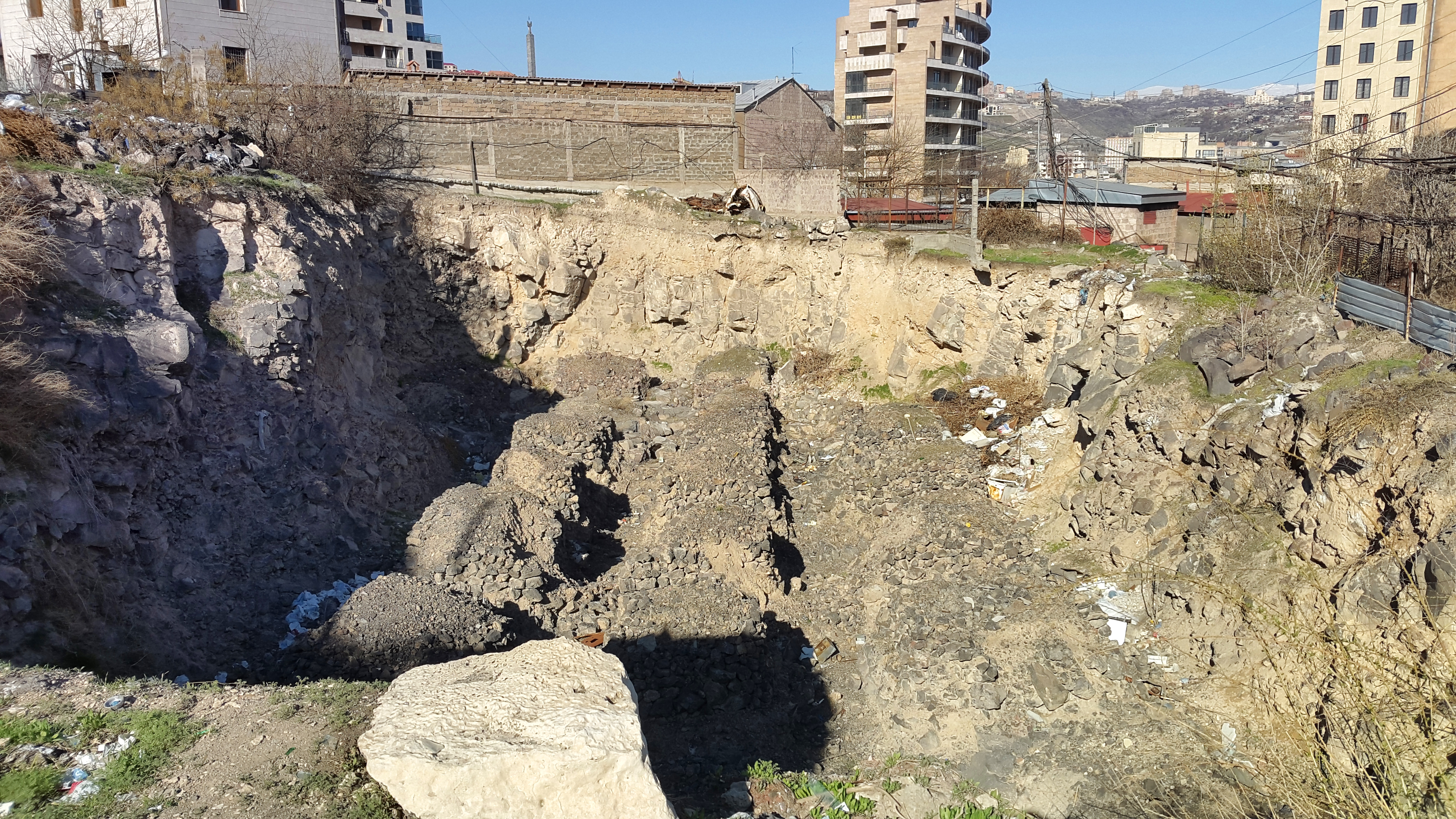 Կոզեռն թաղամասը